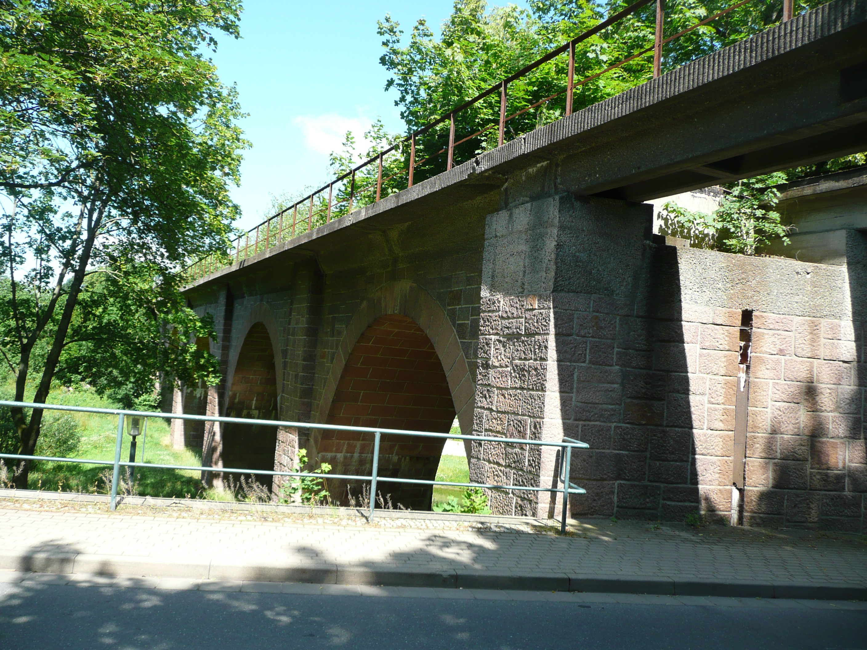 Viadukt über das Saubachtal in Wilsdruff